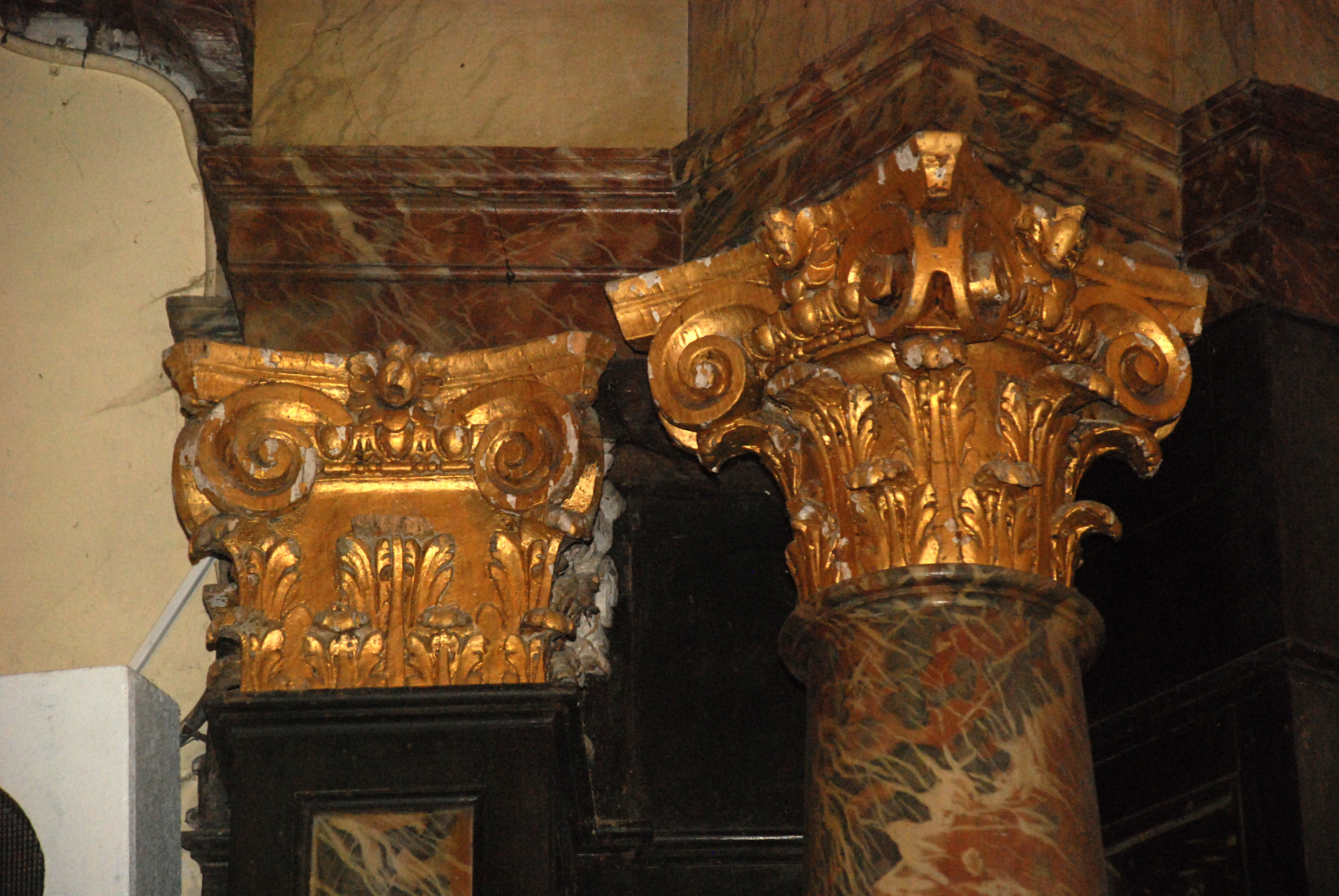 Belgique - Brabant wallon - Église Saint-Martin de Ways